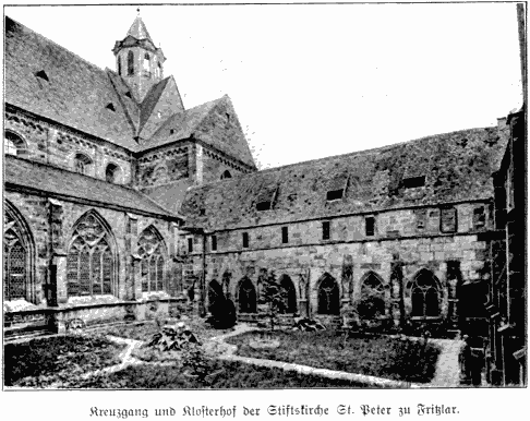 Kreuzgang und Klosterhof der Stiftskirche St. Peter zu Fritzlar. Abbildung aus "Deutsche Kultur des Mittelalters in Bild und Wort" von Dr. Paul Herre. Verlag von Quelle & Meyer in Leipzig 1912 Public Domain.